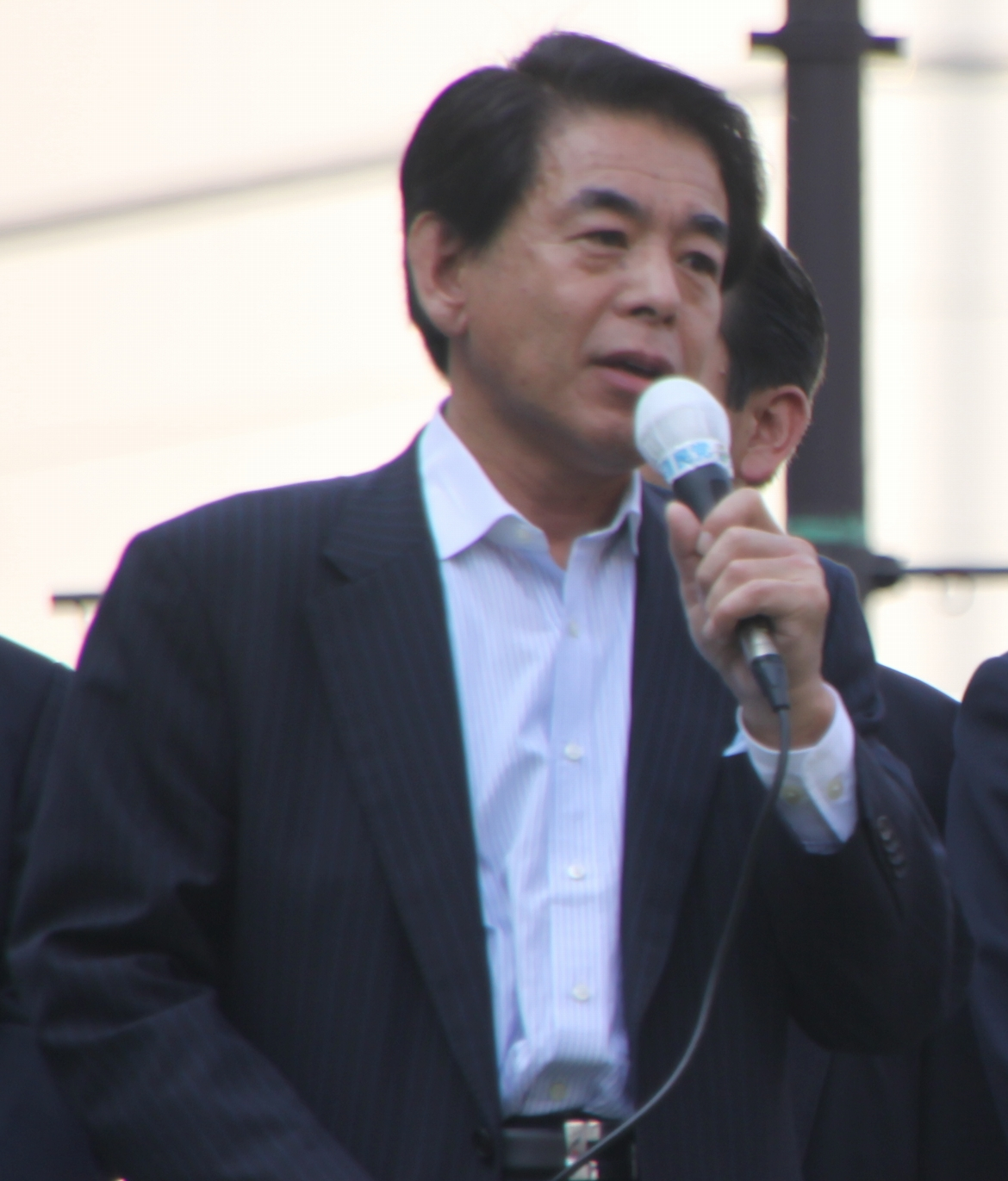 下村博文、創生「日本」による池袋駅での演説